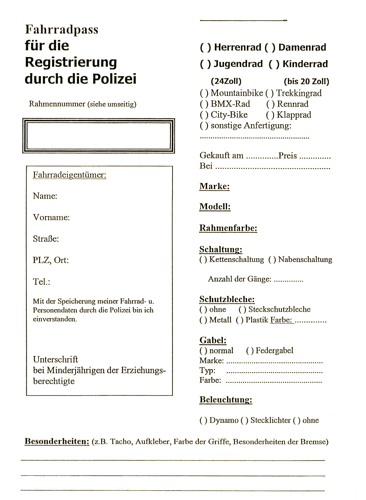 Fahrradpass der Bayerischen Polizei